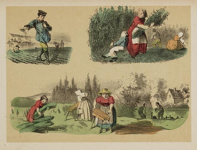 Educatieve plaatjes uit 1873 over het werk op een hennepakker